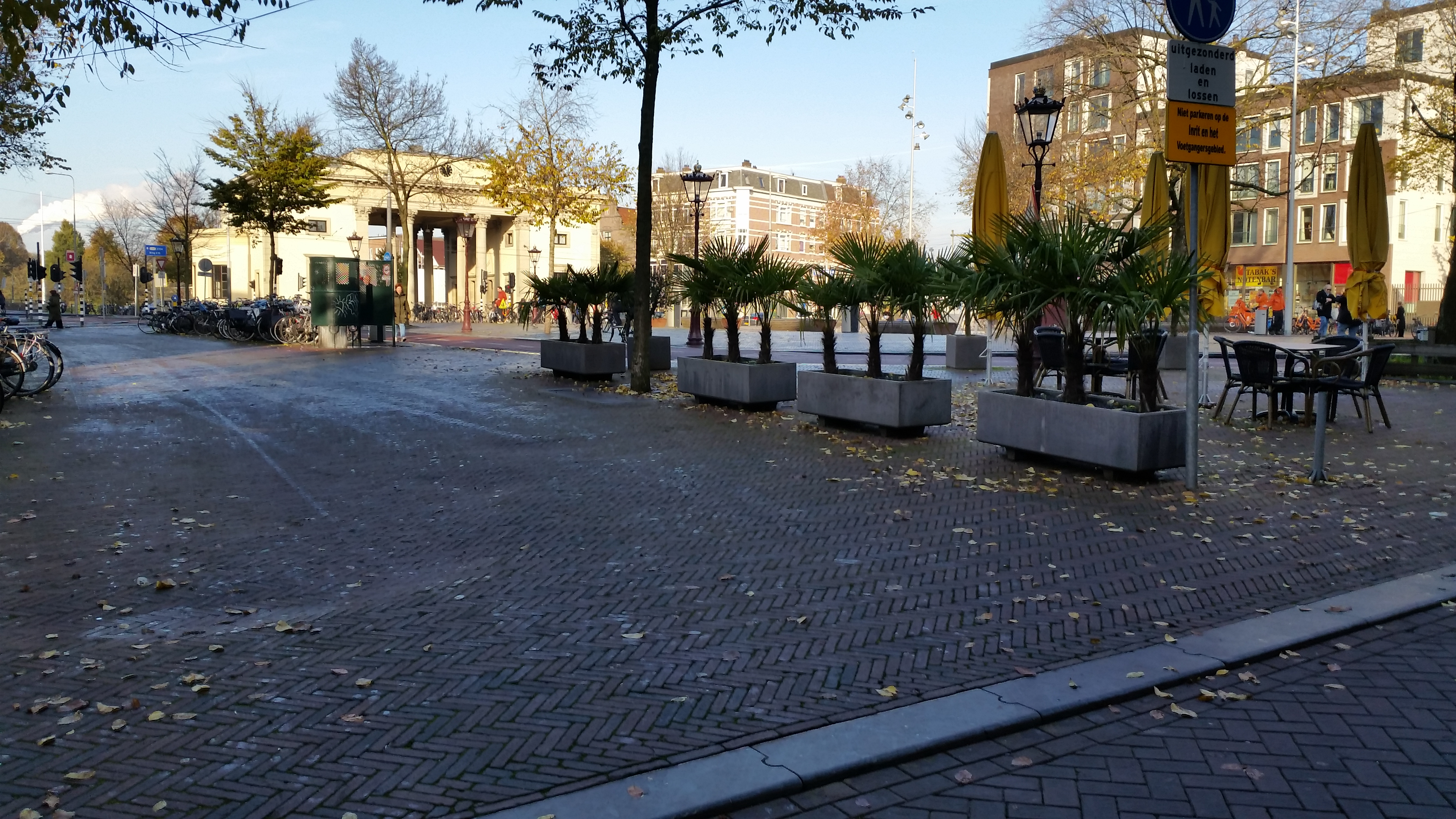 Impressies Haarlemmerplein, Amsterdam november 2019